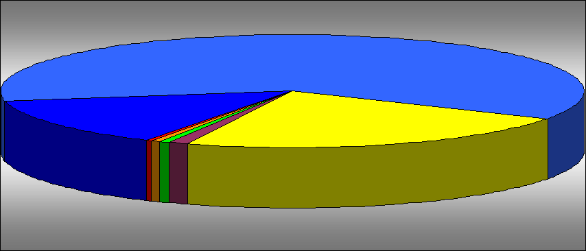 Religión en España (source???): Católicos practicantes Católicos no practicantes Ateos o no religiosos Protestantes Musulmanes Budistas Bahá'ís